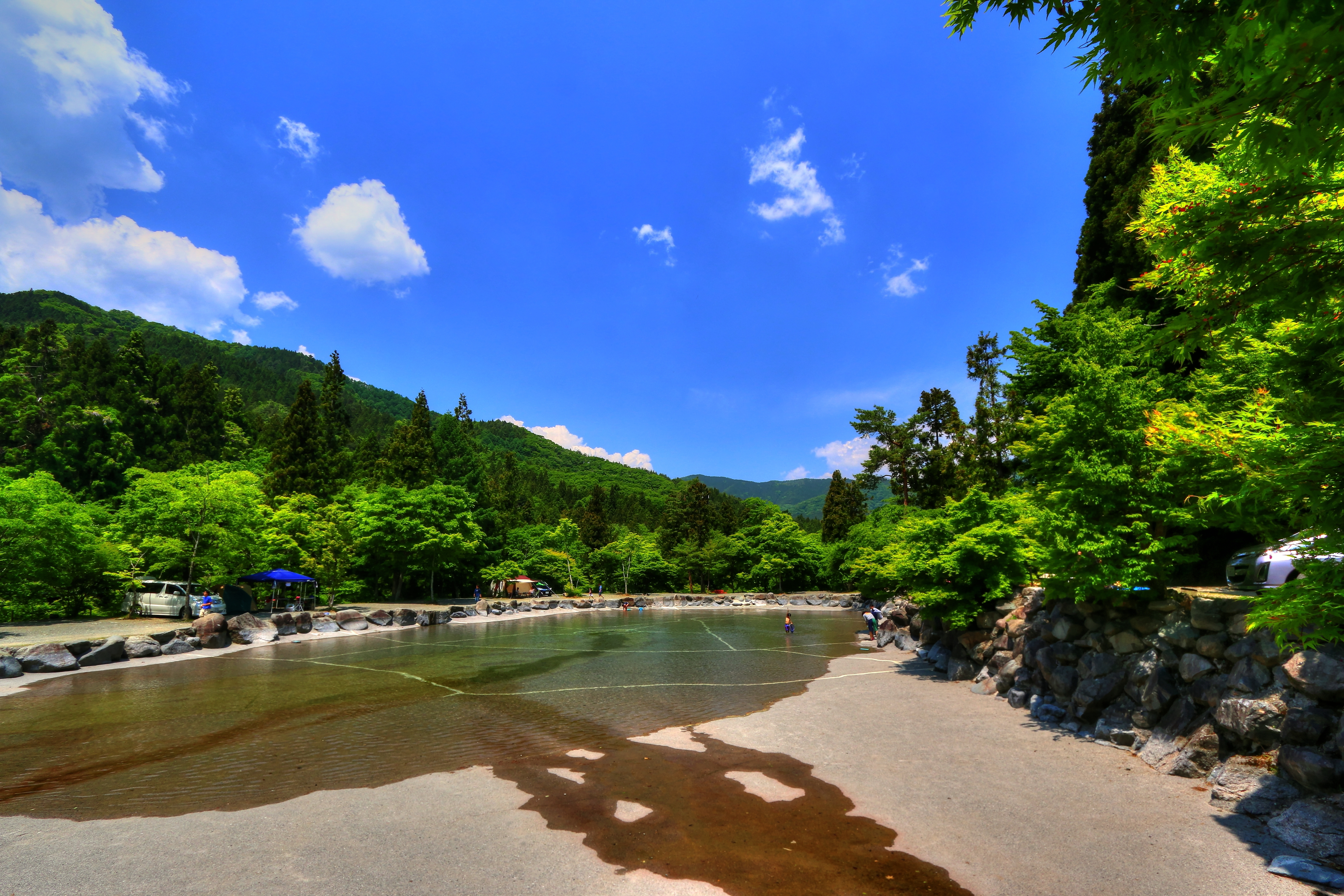 道志の森キャンプ場